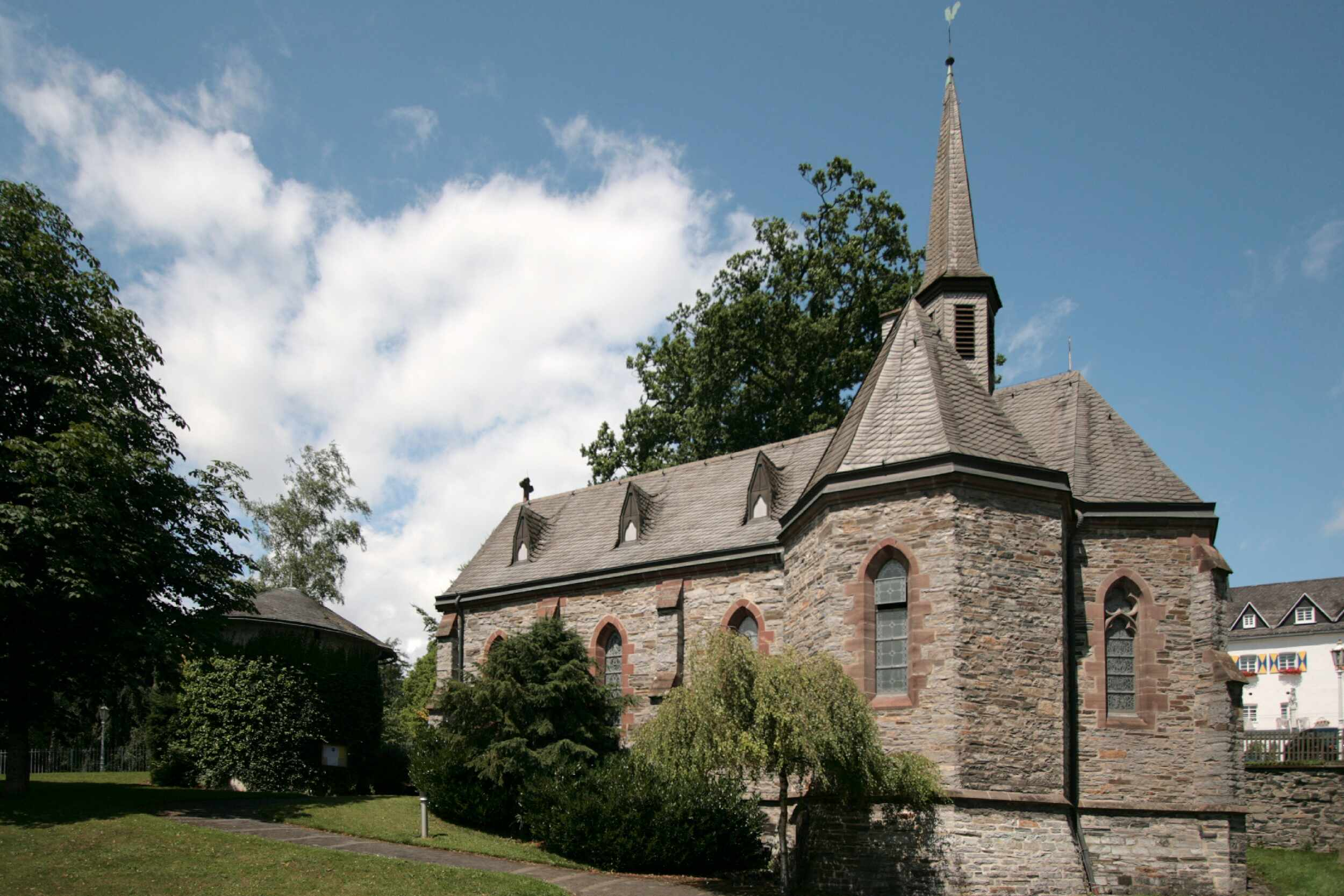 Beschreibung: Außenansicht Kapelle Gevelinghausen Quelle: Eigenes Foto Urheber: Wolfgang Poguntke Aufnahmedatum : 12.07.2008